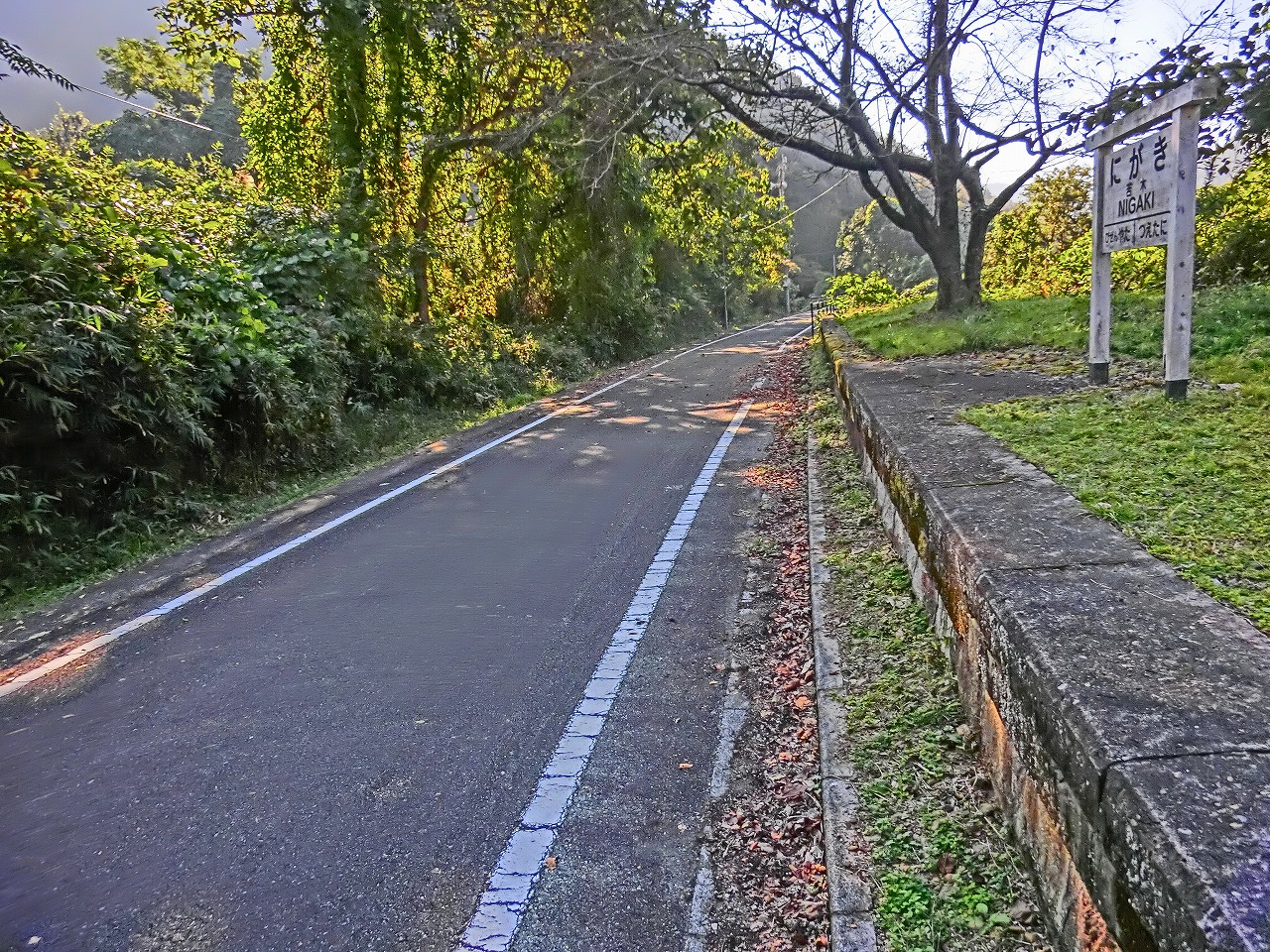 岡山県道703号備前柵原自転車道線 旧同和鉱業片上鉄道